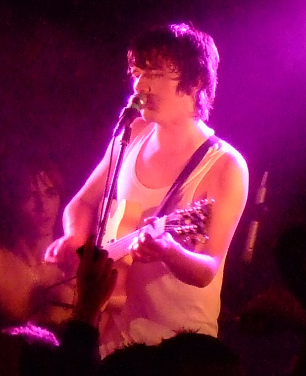 Kieren Webster of The View